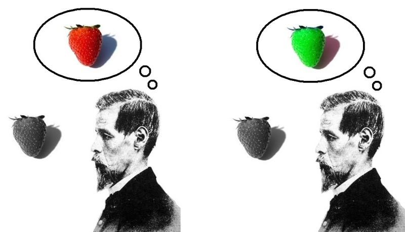 Inverted qualia